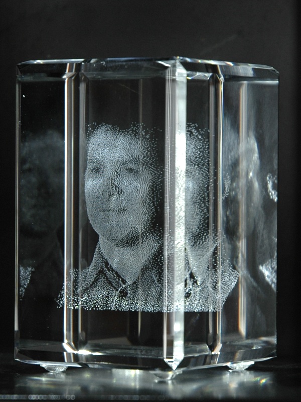 Foto eines Glasblocks aus optischem Glas mit belasertem 3D Portrait. Erstellt von LOOXIS während der Olympischen Winterspiele in Salt Lake City 2002, Abmessungen 50x50x80mm.